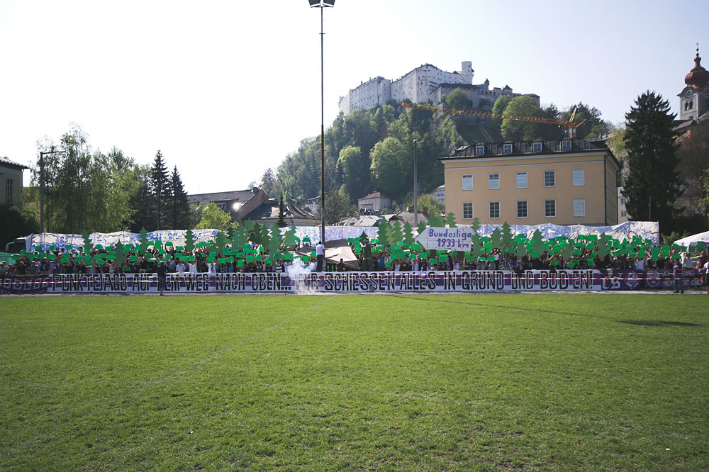 Fans der neugegründeten Austria Salzburg bei einem Heimspiel gegen den USV Schleedorf